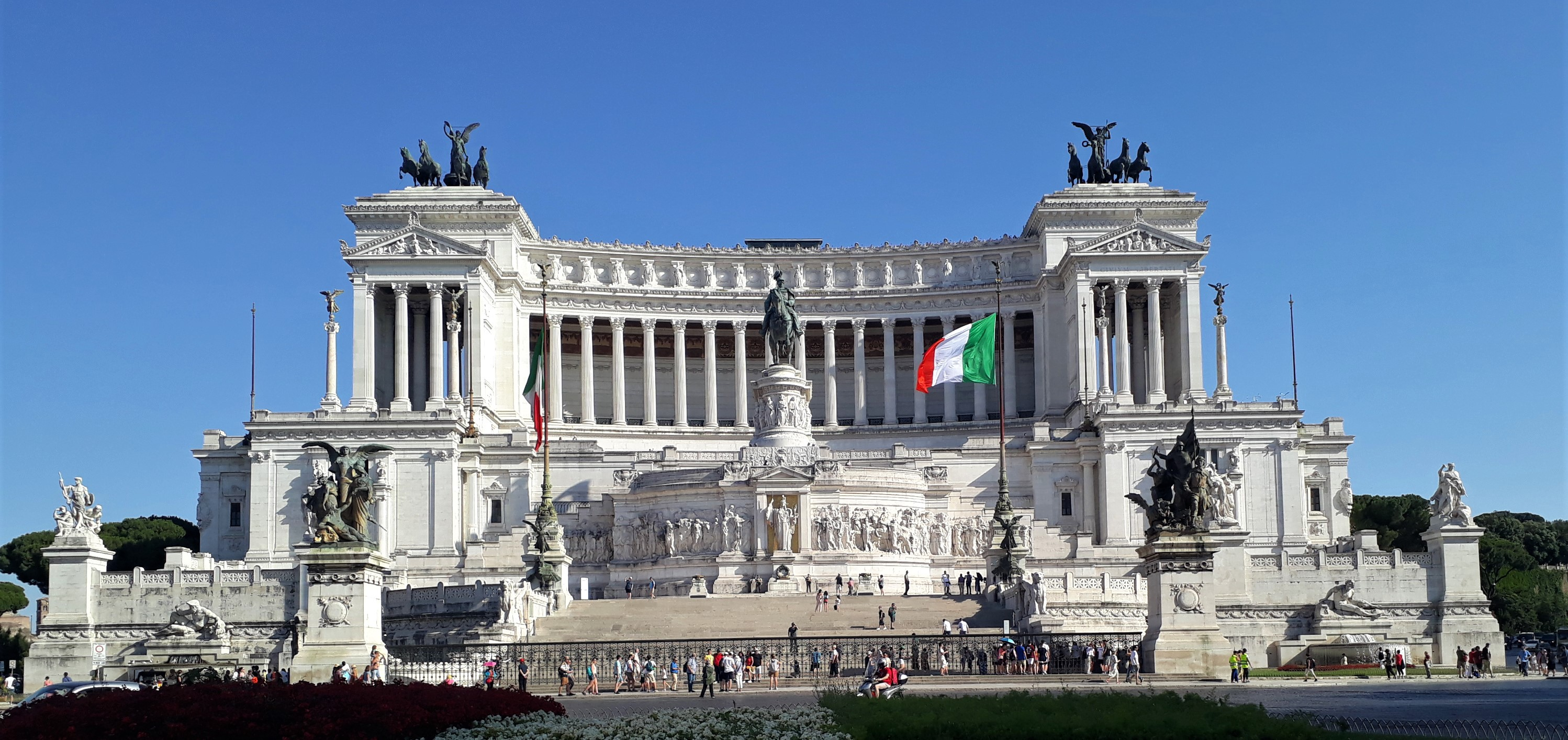 Vittoriano gezien vanaf Piazza Venezia